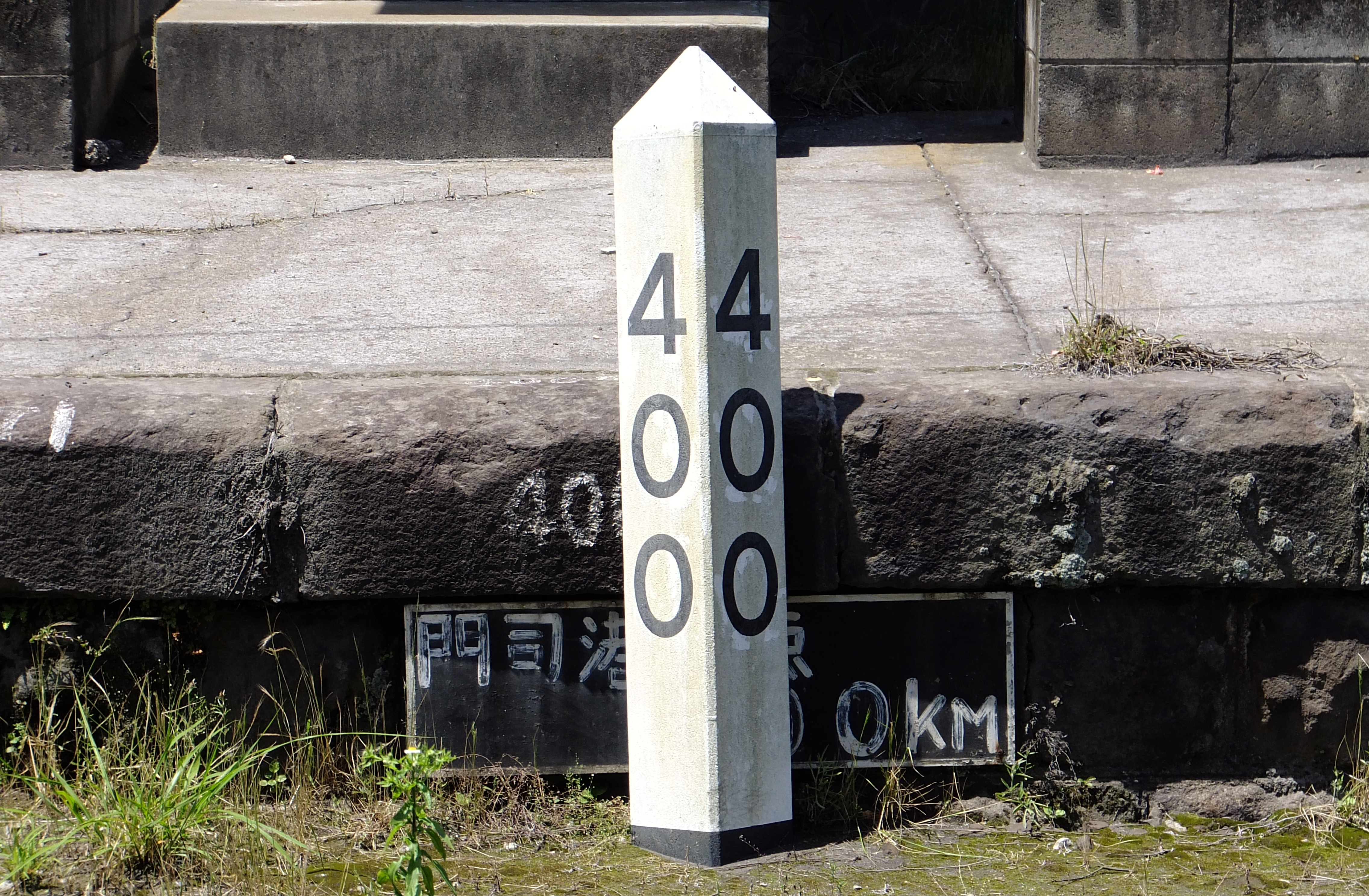 鹿児島本線・日豊本線、鹿児島駅構内の400kmキロポスト。